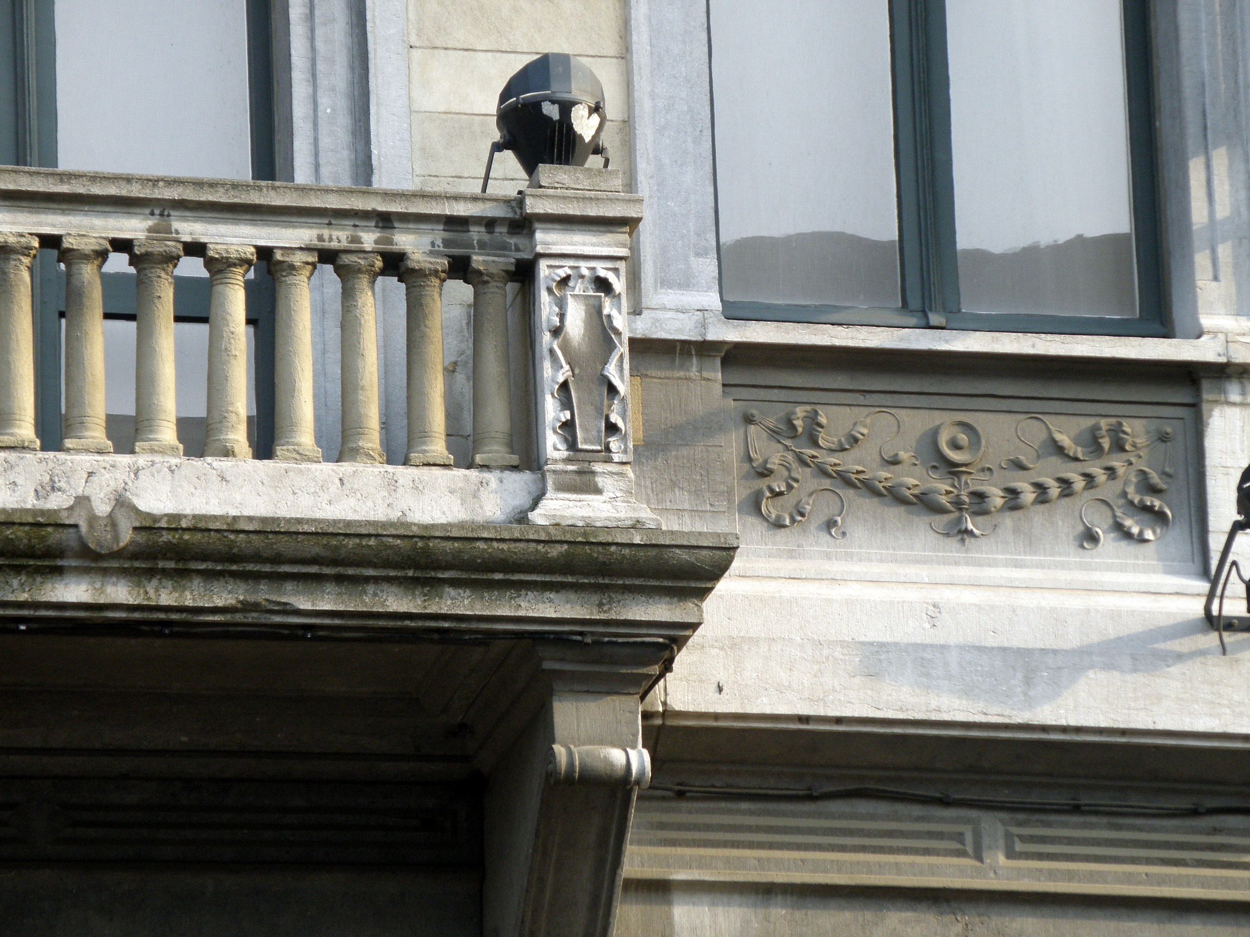 Anvers, Belgique. Maison de style néo-classique, sise aux n° 54 et 56 de la Plantin en Moretuslei. Balcon du premier étage (balustrade et dé) et allège sculptée. Architecte : Ernest Stordiau, 1898.